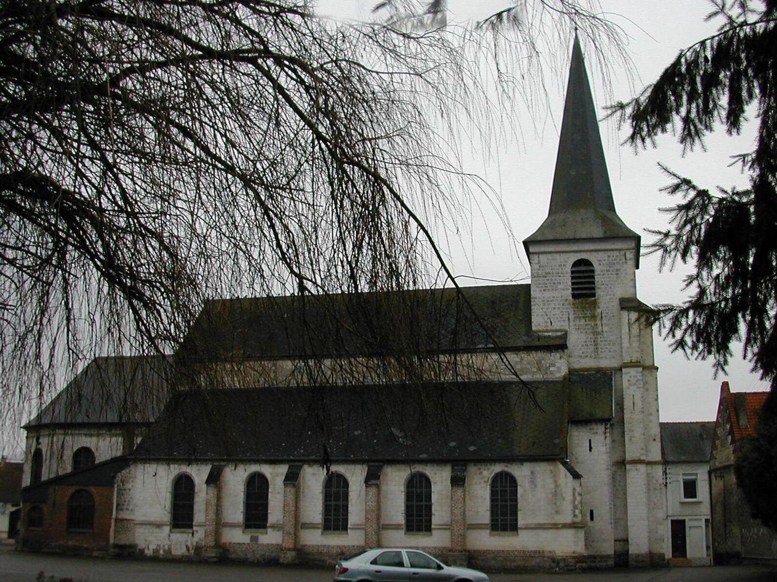 église Blangy-sur-Ternoise